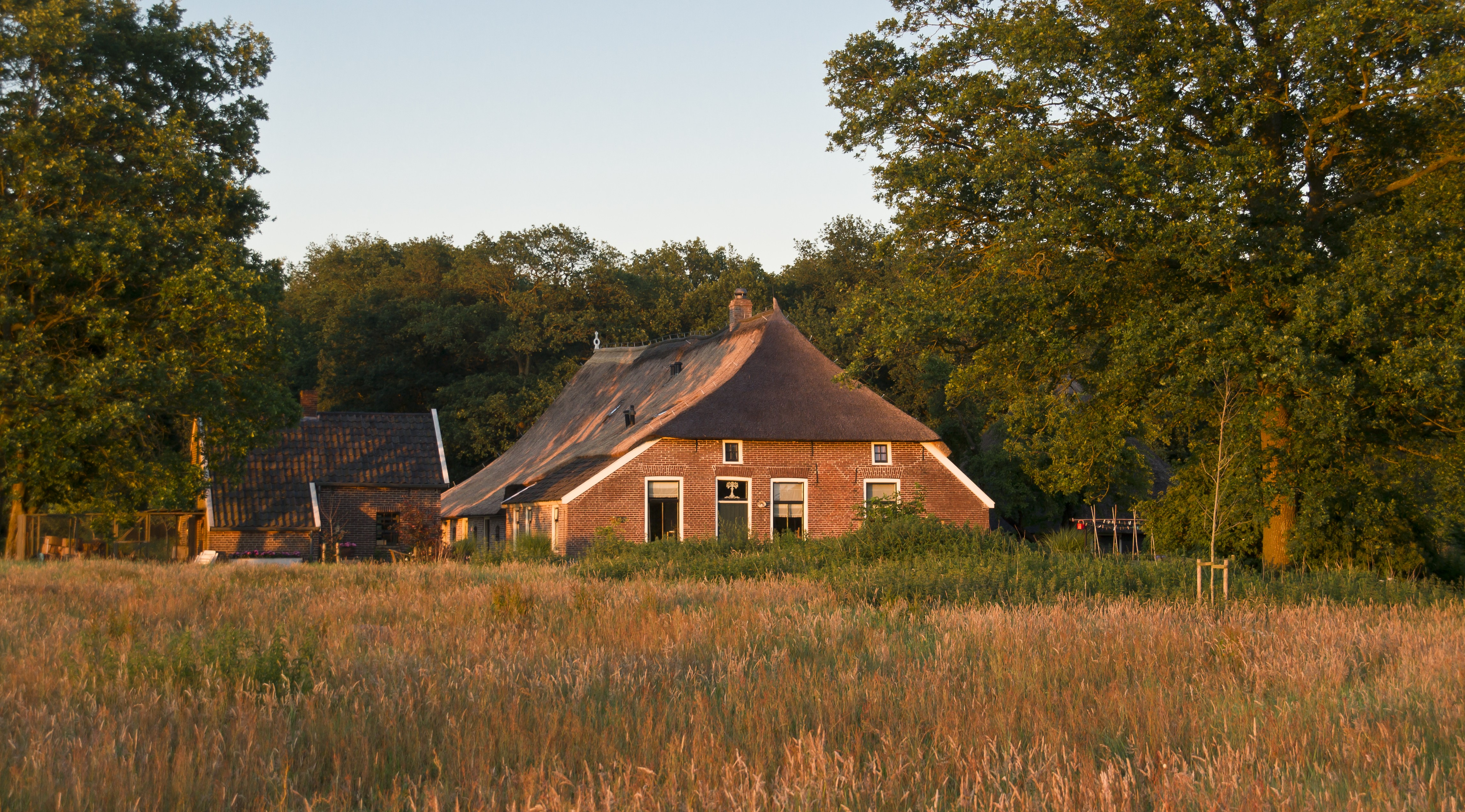 De Wildenberg (at sunset) - Zuidwolde - Drenthe - the Netherlands